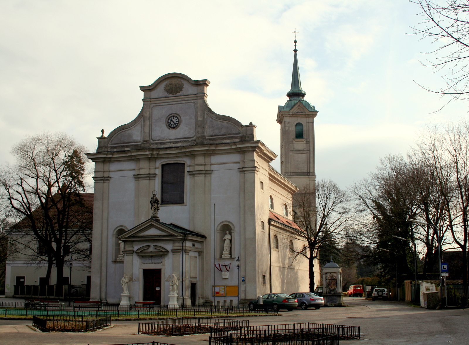 Vorhalle und Fassade Pfarrkirche Mariabrunn